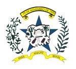 Brasão Anajás